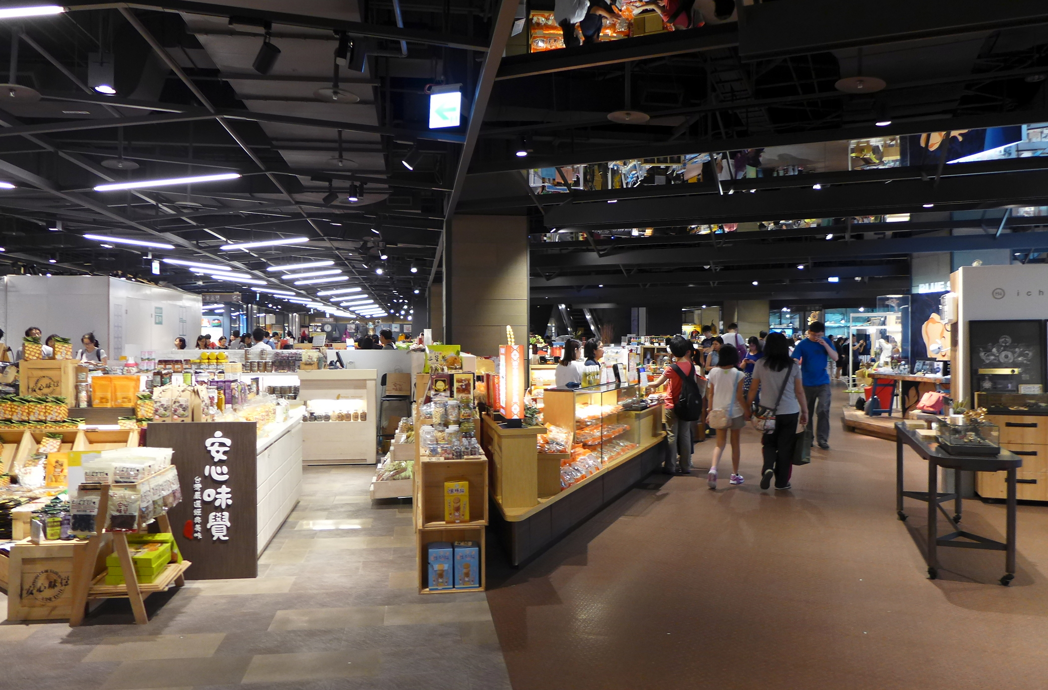 中文（台灣）: 誠品生活松菸店。